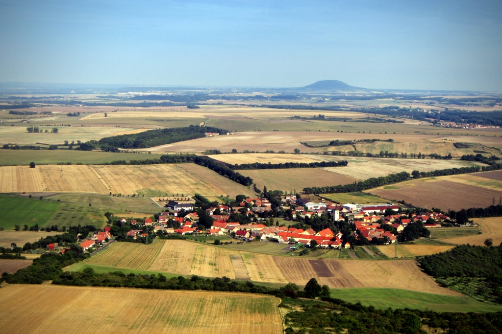 Pohled z hradu Házmburk na Slatinu, v dáli hora Říp